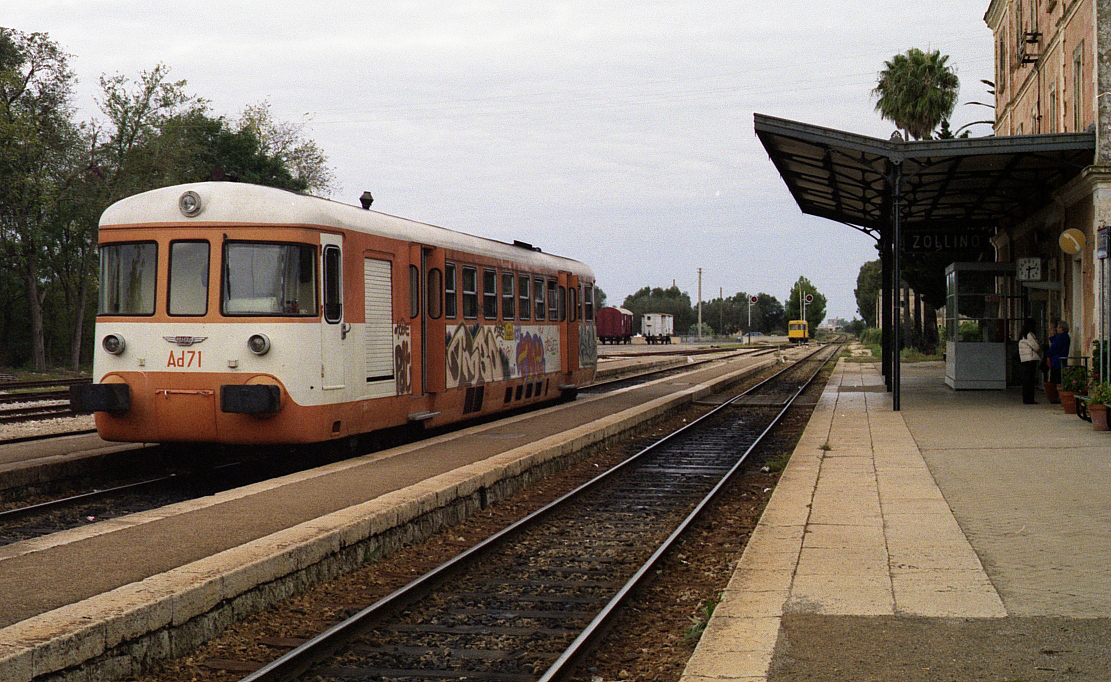 Automotrice Ad 71 delle Ferrovie del Sud-Est in sosta a Zollino.